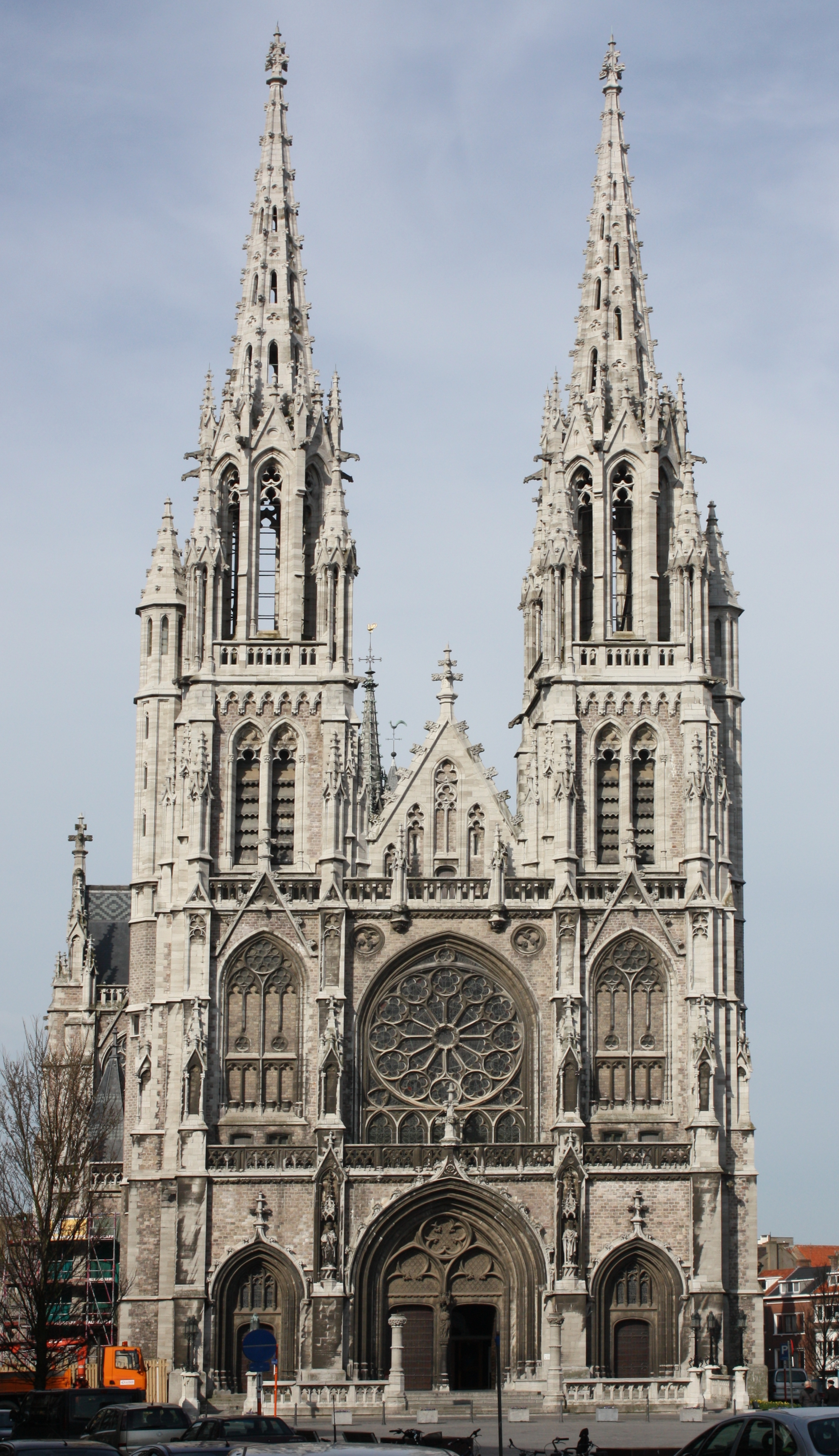 Église saint-Pierre et Paul d'Ostende.